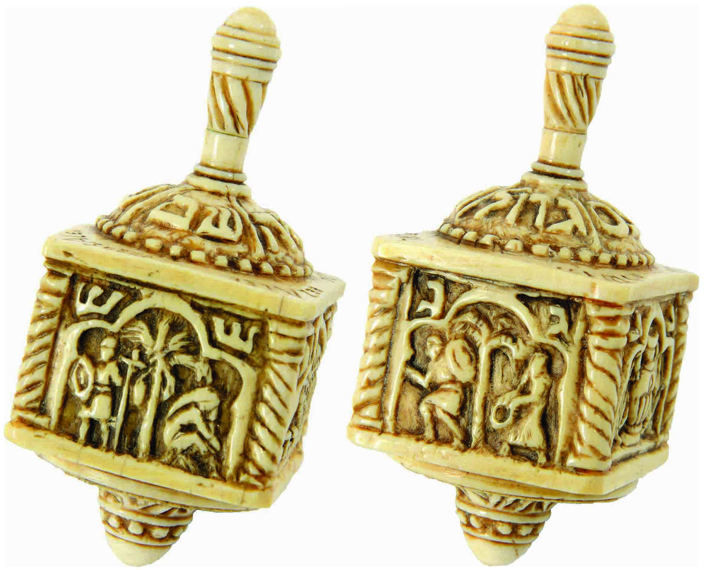 סביבון שנהב מורו